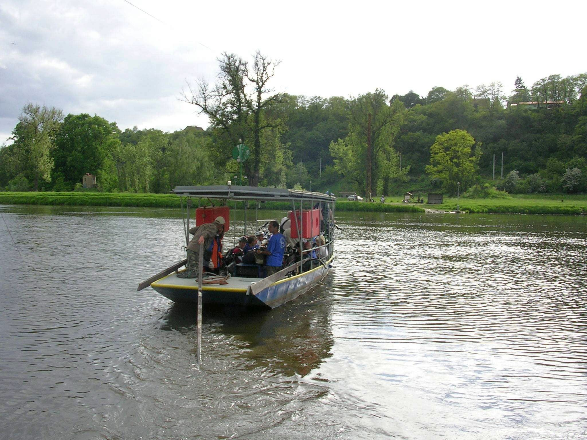 Přívoz Klecánky–Roztoky, okres Praha-východ/Praha-západ, odjezd z pravého břehu (Klecánky)